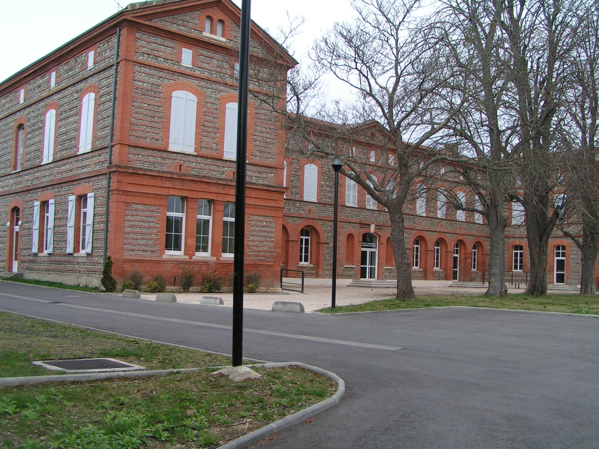 Maison Jallier Carbonne. Refuge pour les pauvres au XVIIè siècle, hôpital militaire puis hospice au XIXè siècle ce bâtiment est maintenant le siège de la communauté de communes du Volvestre.